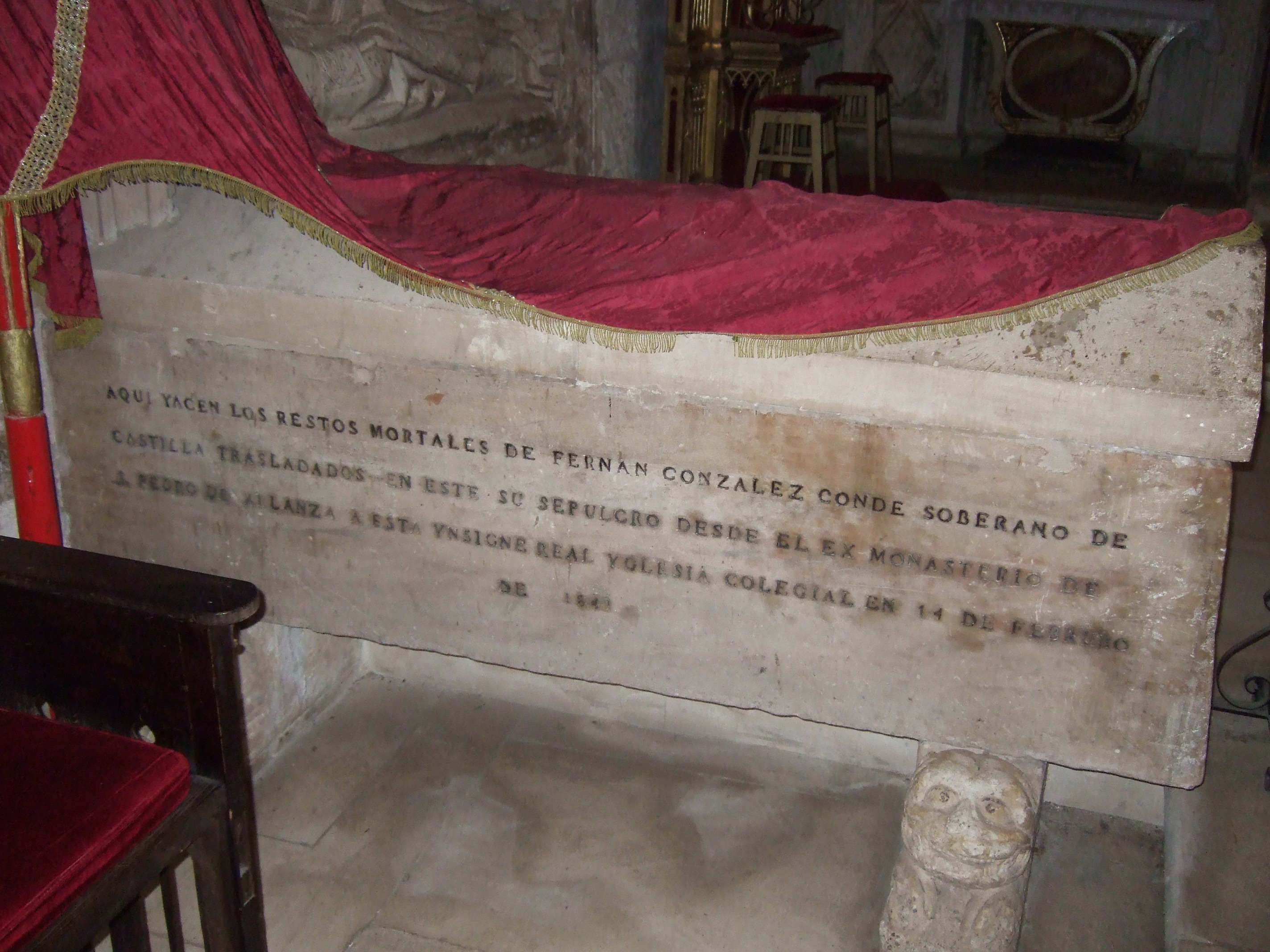 Colegiata de San Cosme y San Damián, Covarrubias - Tumba del conde Fernán González; sarcófago de alabastro del siglo V